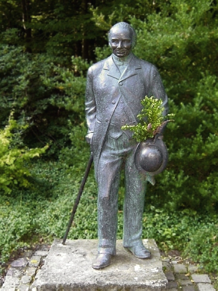 Bronzestatue von Baron Ludwig Knoop in Knoops Park, Bremen-St. Magnus, Deutschland. Die Statue wurde 1994 von dem deutschen Bildhauer Claus Homfeld geschaffen.